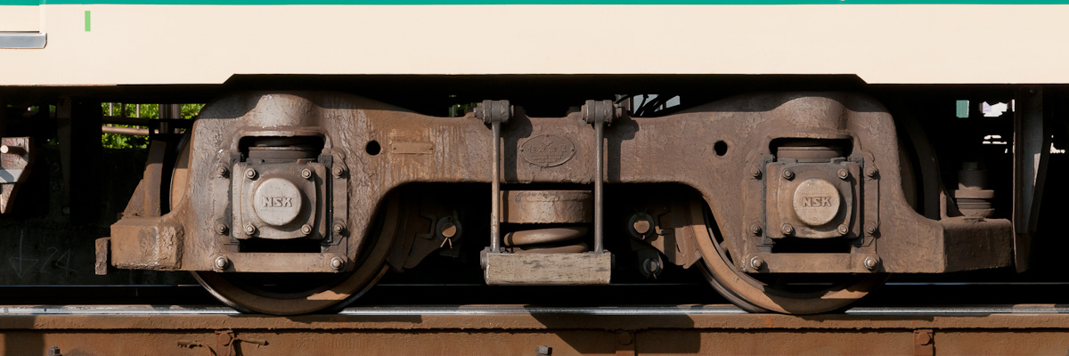 都電荒川線7000形（7001）のD20A形台車、住友金属製。